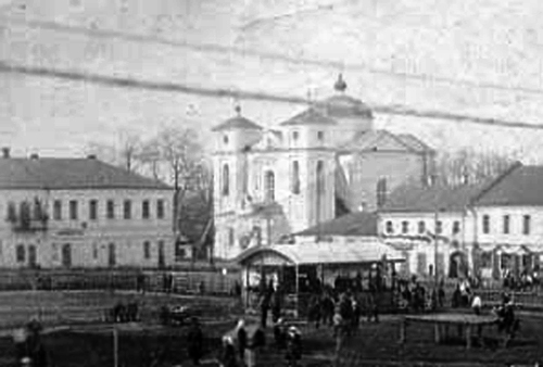 Беларуская (тарашкевіца): Касьцёл Спачыну Найсьв. Панны Марыі ў Вяліжы, фрагмэнт фатаздымка (1.05.1932)